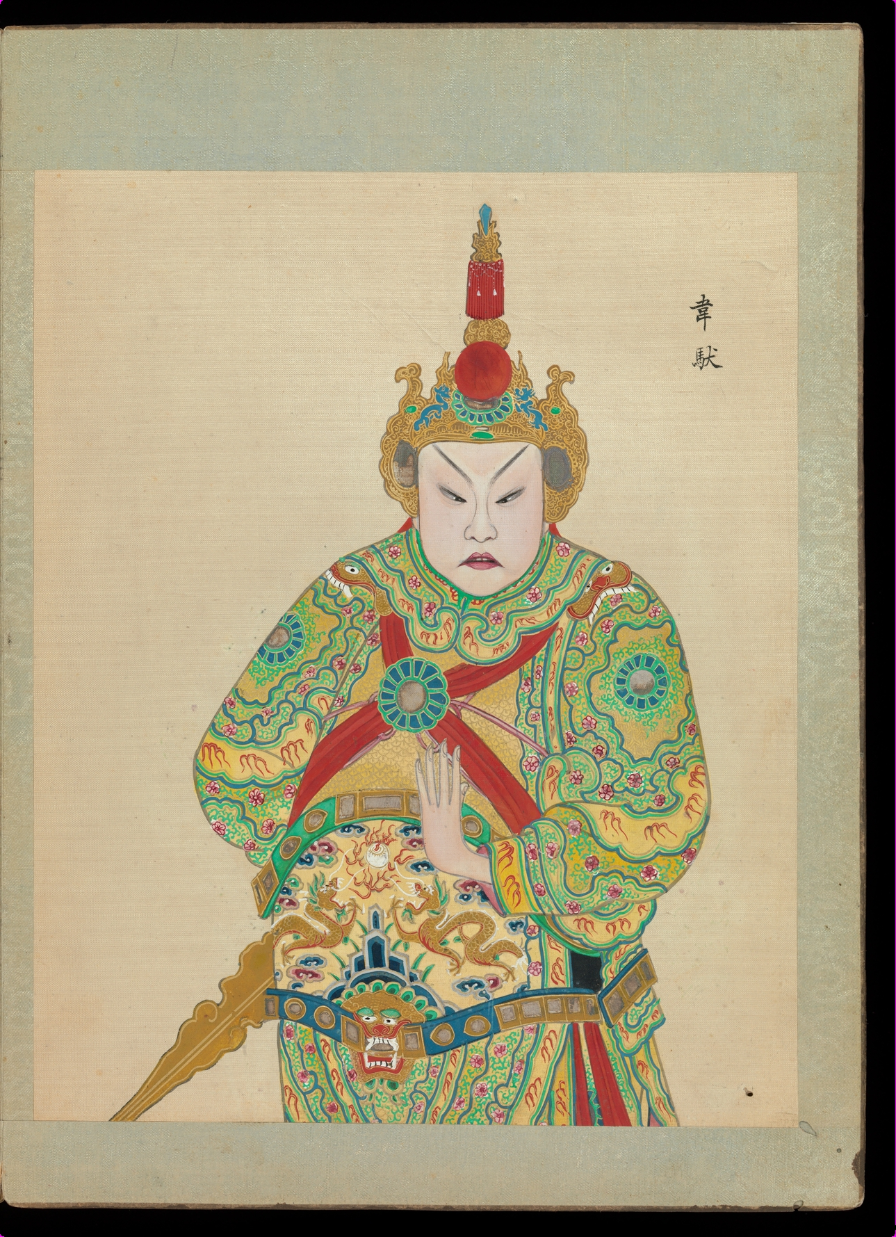 China; Album; Paintings